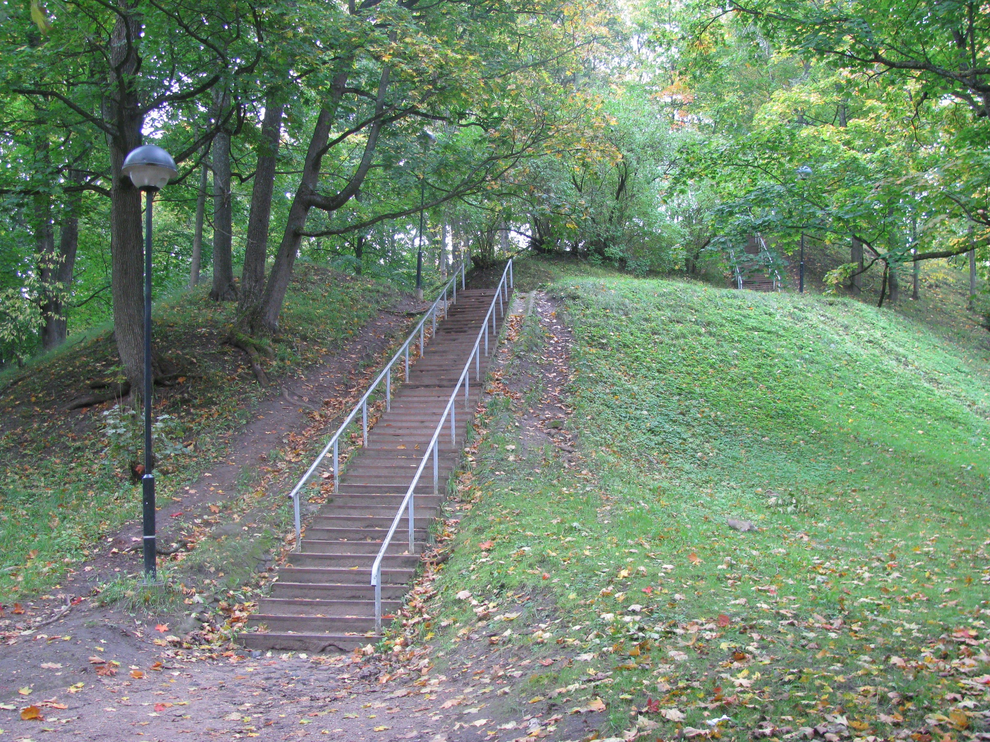 Tartu Toomemäe trepid Baeri ja Oru tänava nurgal.